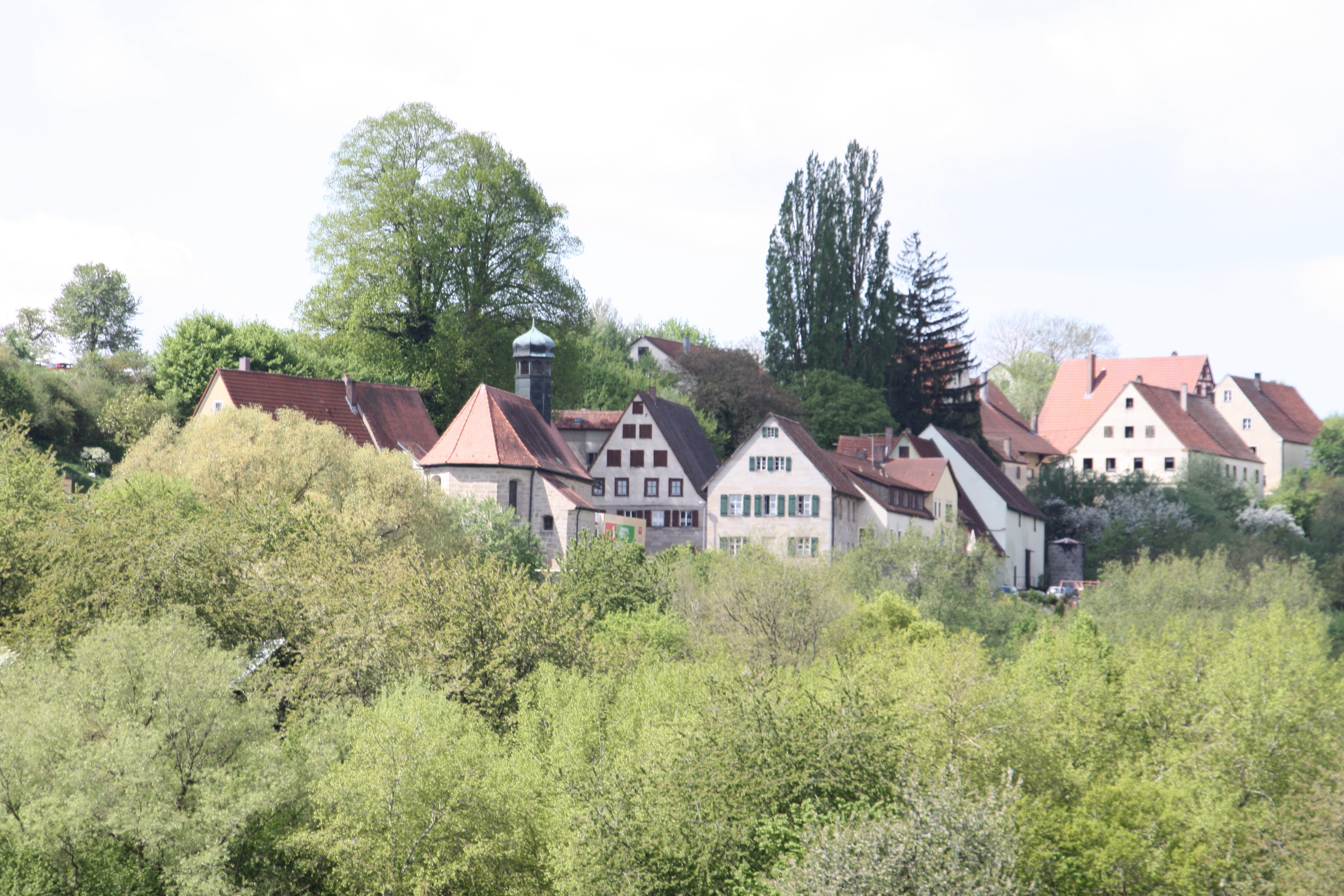 Hagsbronn Blick von Nordosten